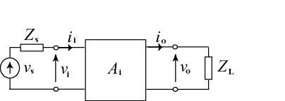 Straumforsterkar